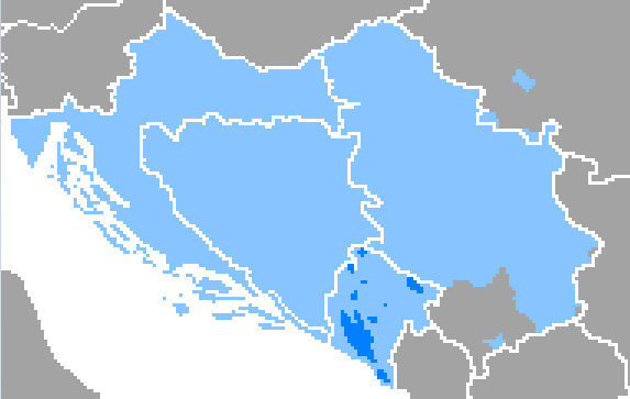 Idioma montenegrino Donde es mayoritario Resto de hablas serbocroatas